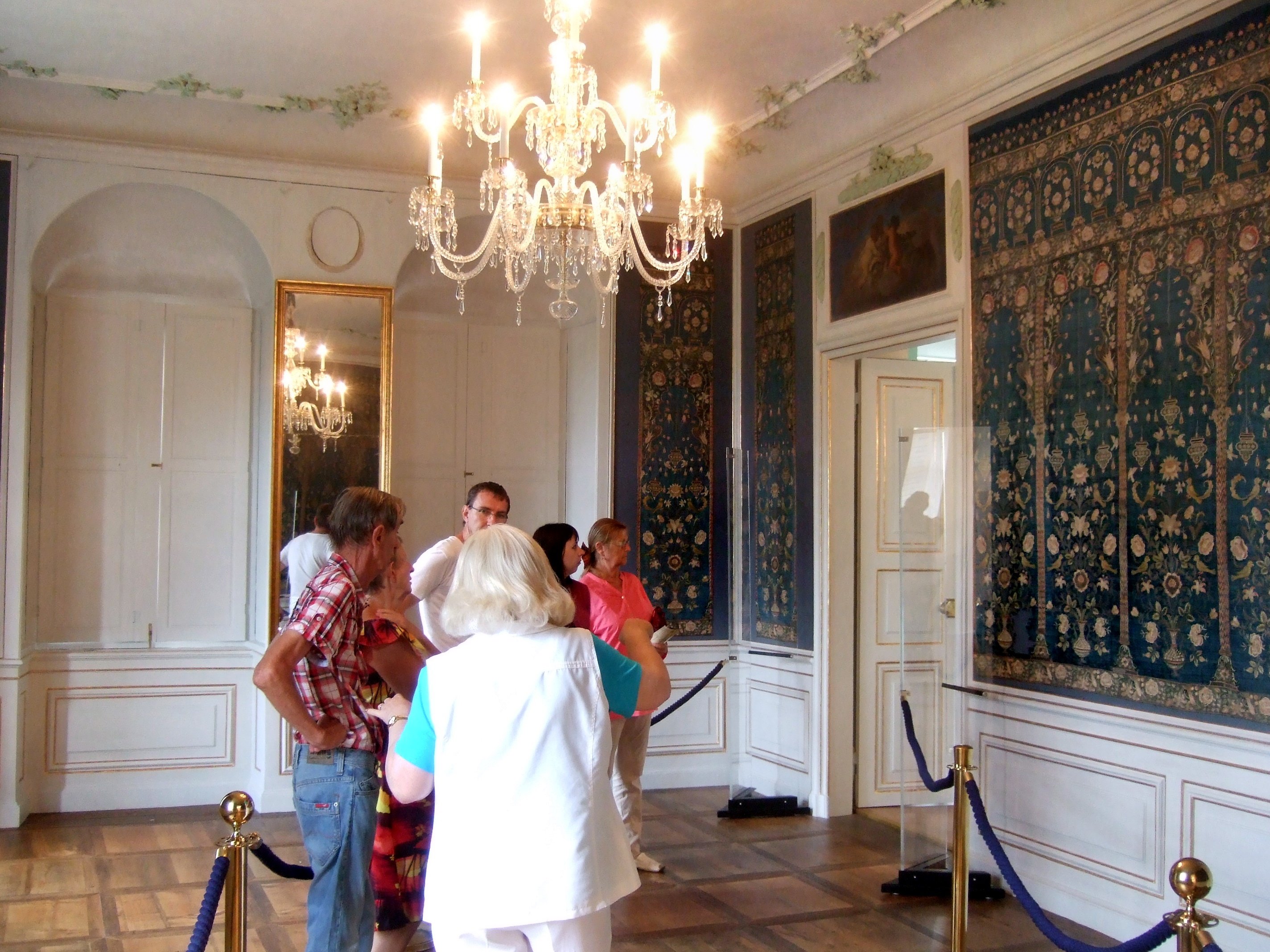 Das Foto zeigt den Blauen Salon im Schloss Wildenfels/Landkreis Zwickau. Kostbare bestickte Seidentapeten zieren die Wände des Blauen Salons. Das prächtige Gewebe aus dem osmanisch-persischen Kulturkreis ist wohl Teil eines sultänlichen Prunkzeltes. Als Kriegsbeute der Türkenkriege kam es durch Graf Friedrich Ludwig zu Solms-Wildenfels und Tecklenburg in der Mitte des 18. Jahrhunderts nach Wildenfels.